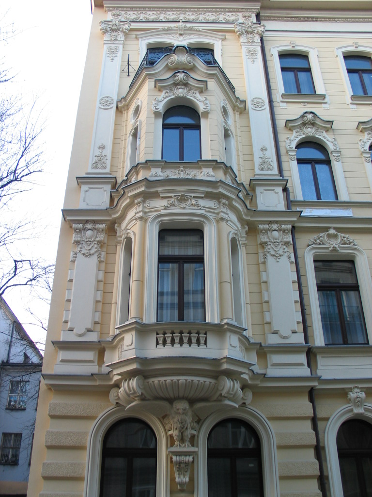 Wykusz kamienicy w Łodzi przy ul. Rewolucji 1905r